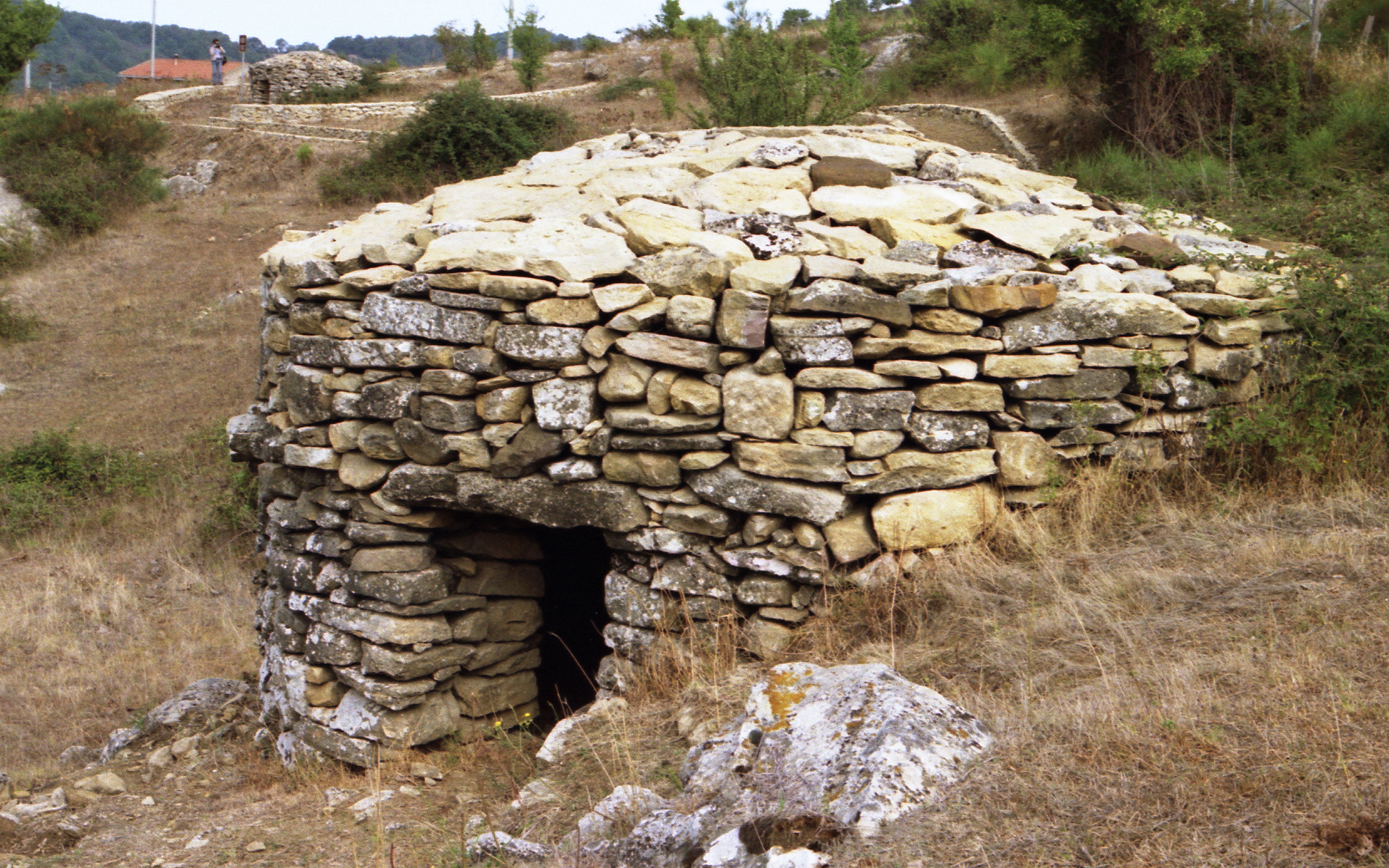 Cubburo situato nel comune di Raccuja